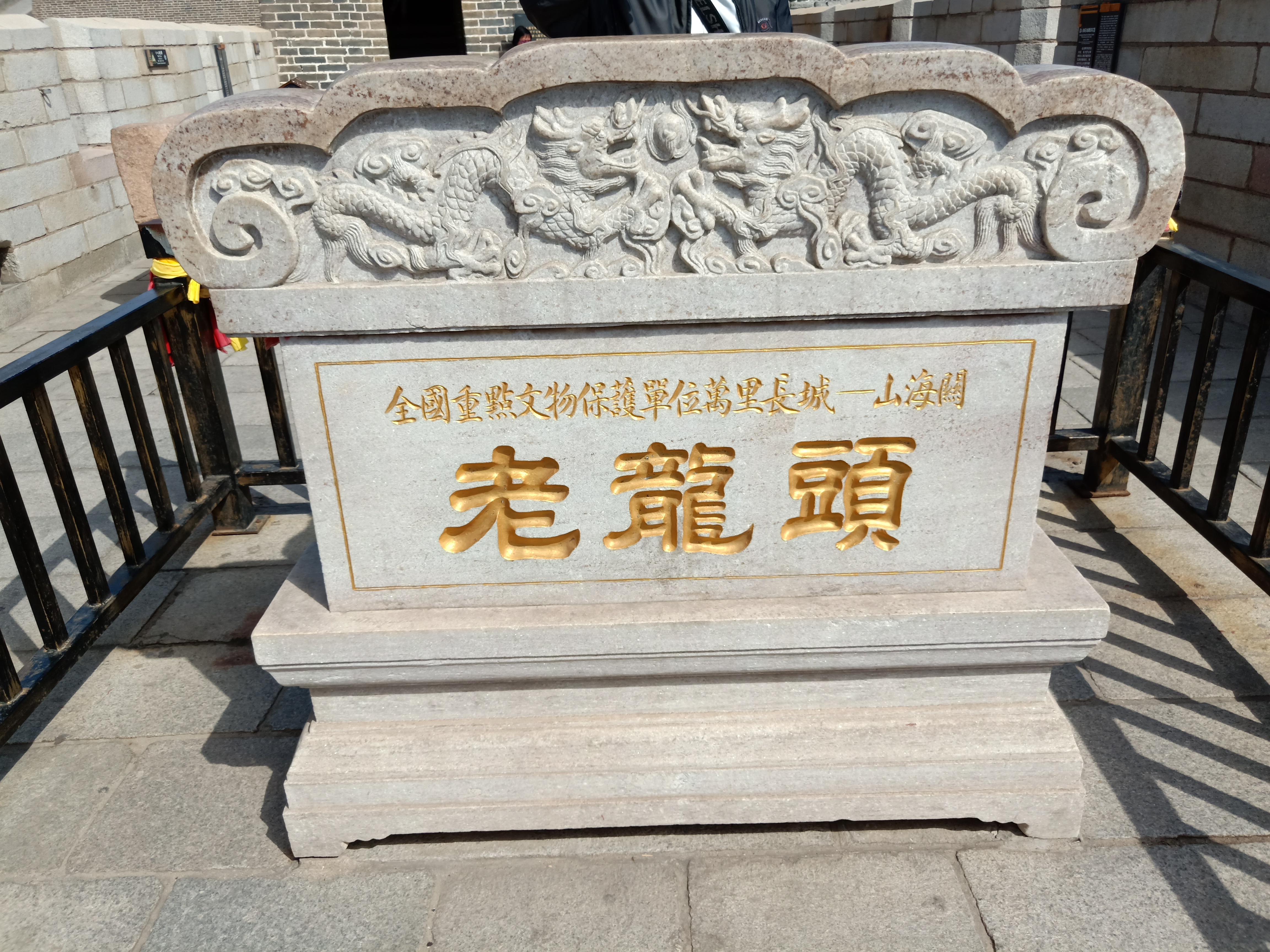 粵語: 老龍頭嘅紀念石